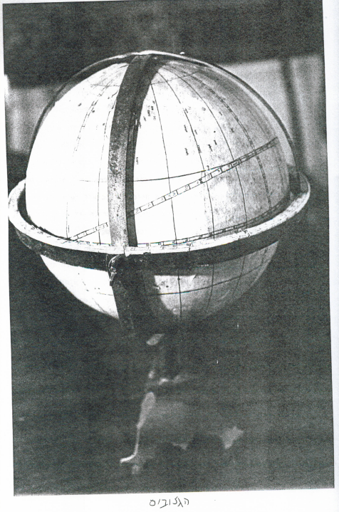 הגלובוס שעשה יהושוע השיל